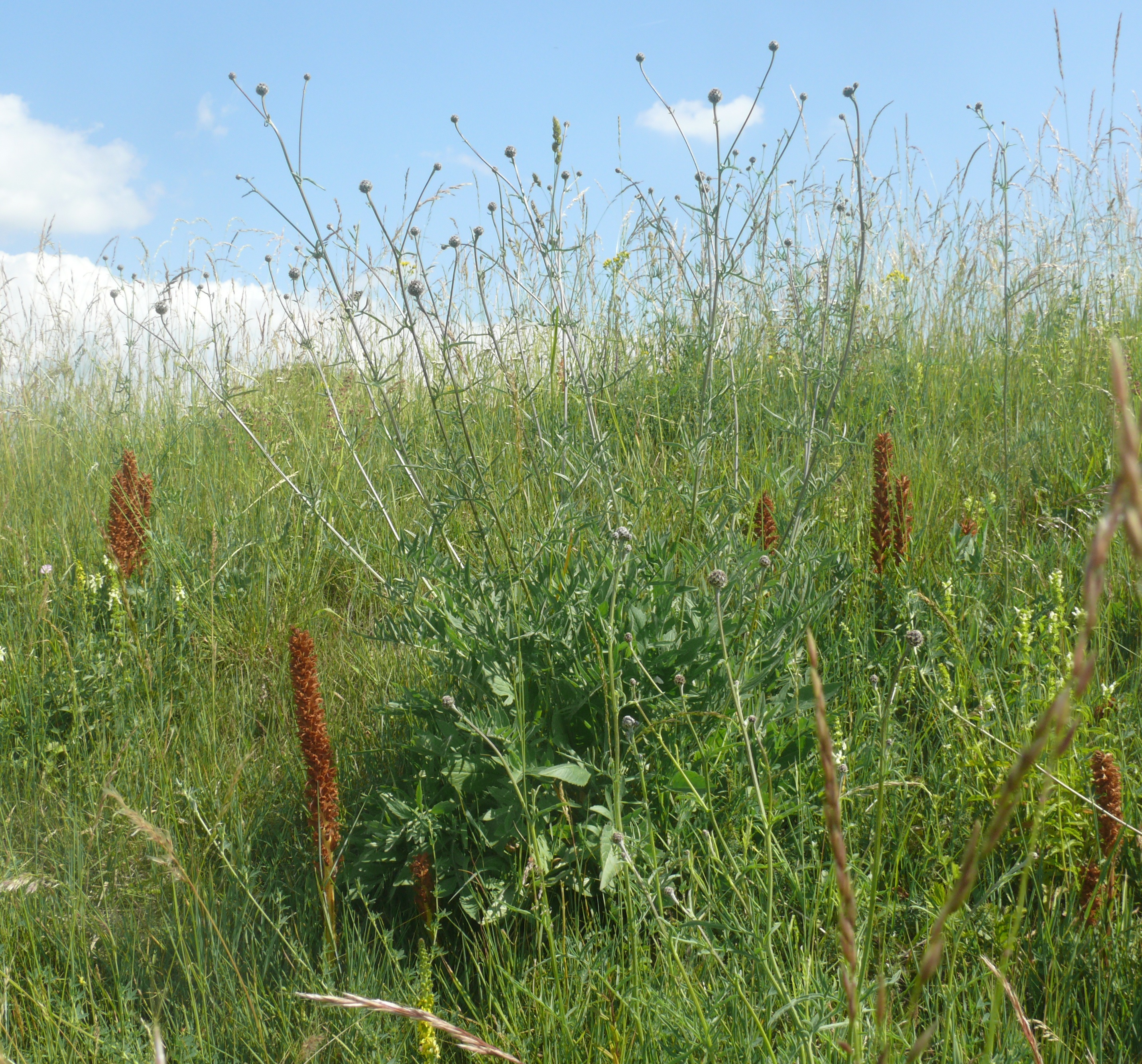 Orobanche elatior and its host Centaurea scabiosa, Nördlinger Ries, Baden-Württemberg, Deutschland